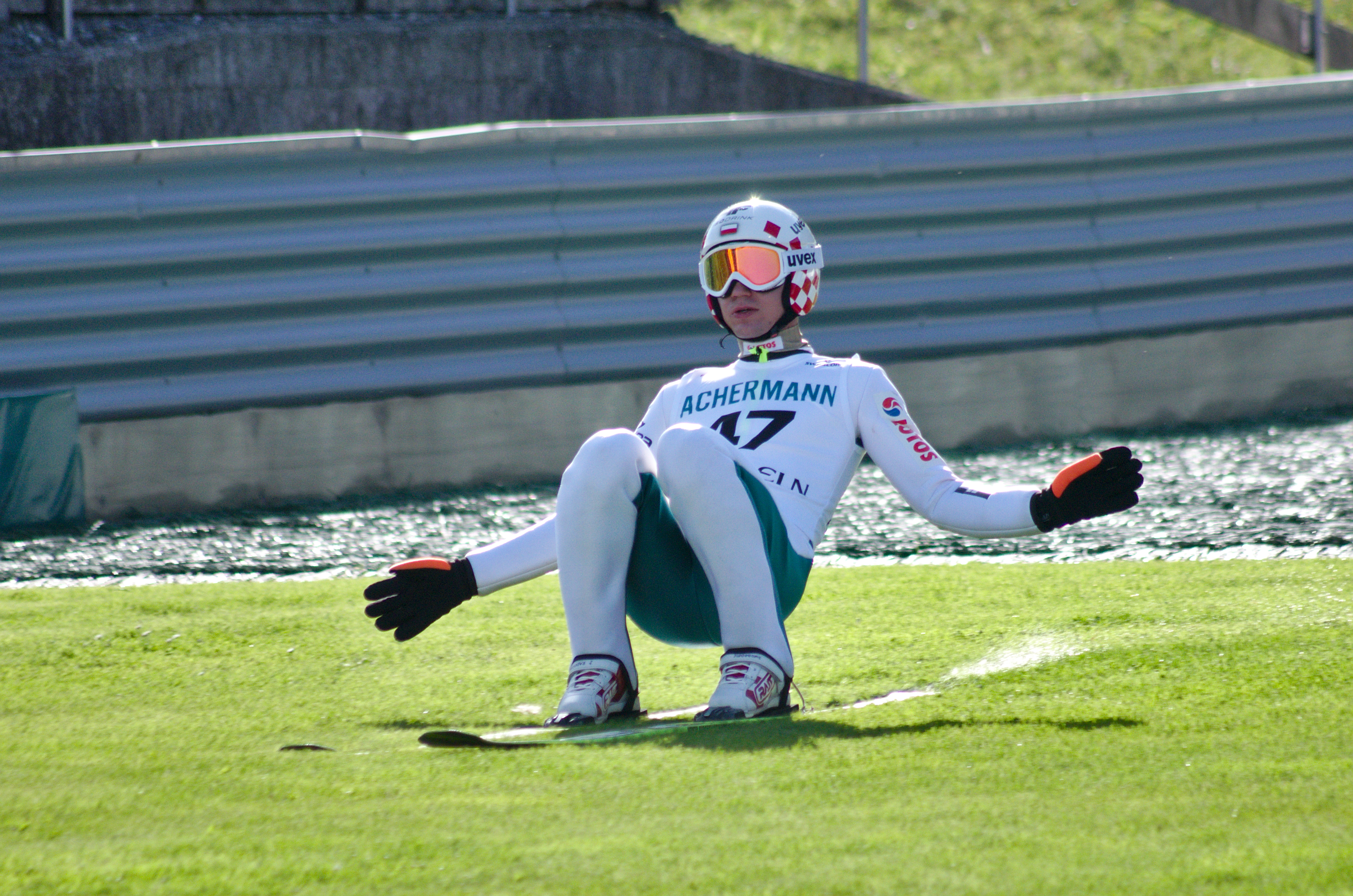 FIS Sommer Grand Prix 2014 - 20140809 - Kamil Stoch